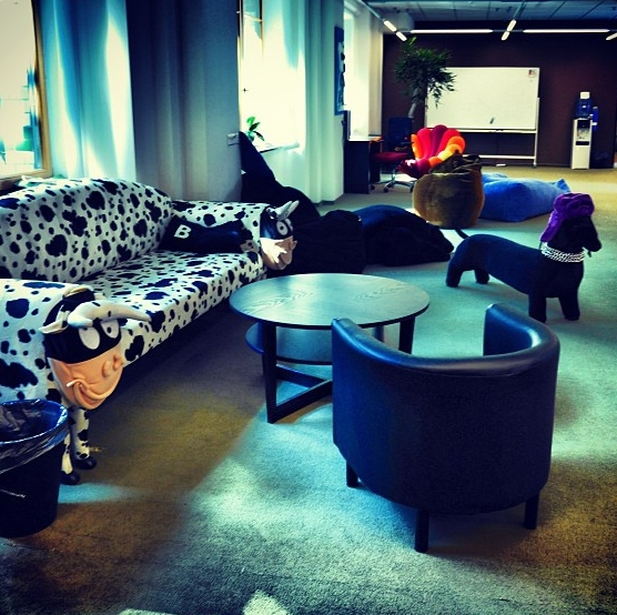 В офисе ВКонтакте